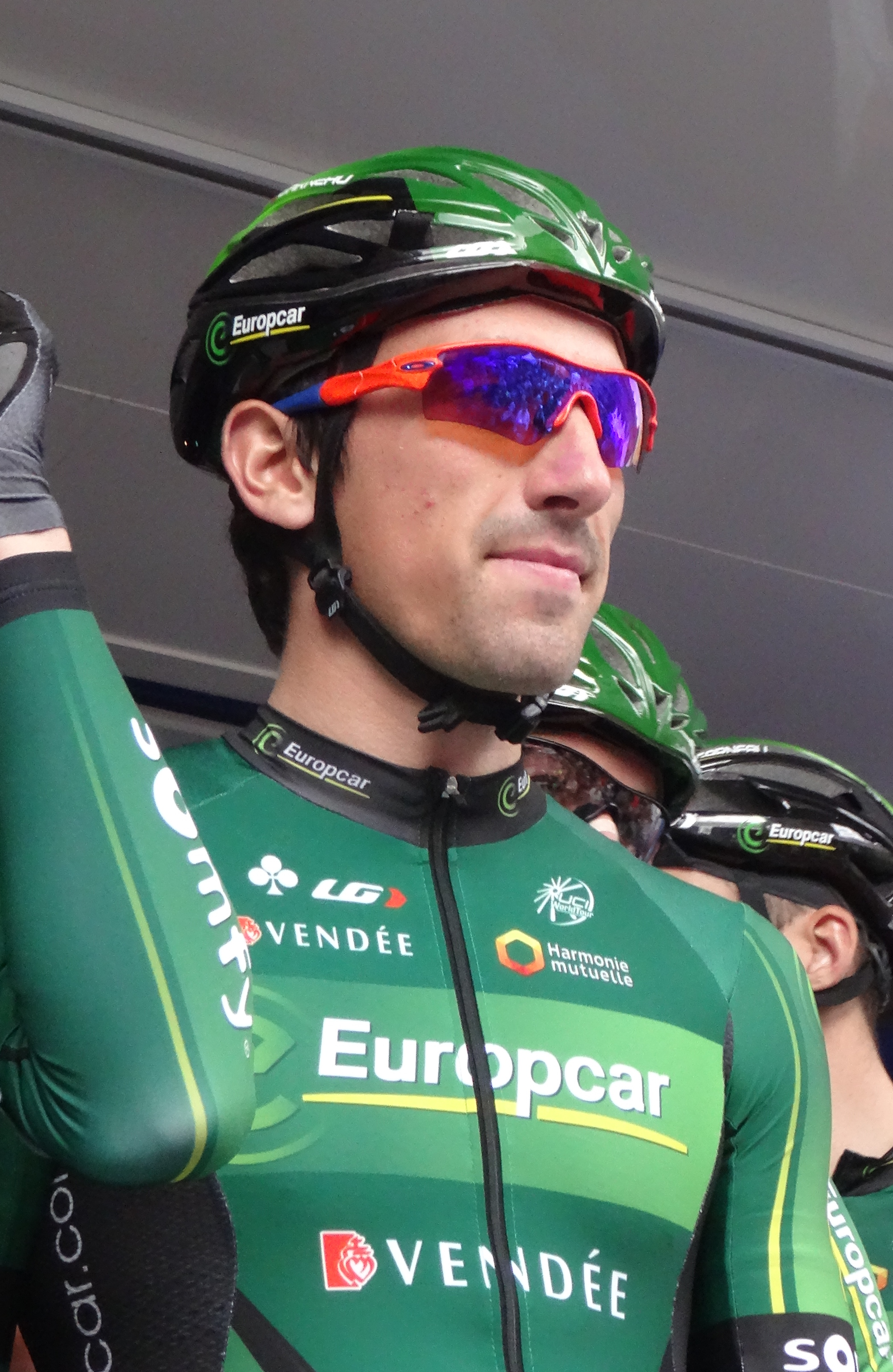 Reportage photographique réalisé le mercredi 7 mai 2014 au départ de la première étape de l'édition 2014 des Quatre jours de Dunkerque à Dunkerque, Nord, Nord-Pas-de-Calais, France. Depicted person: Yannick Martinez Depicted team: Europcar